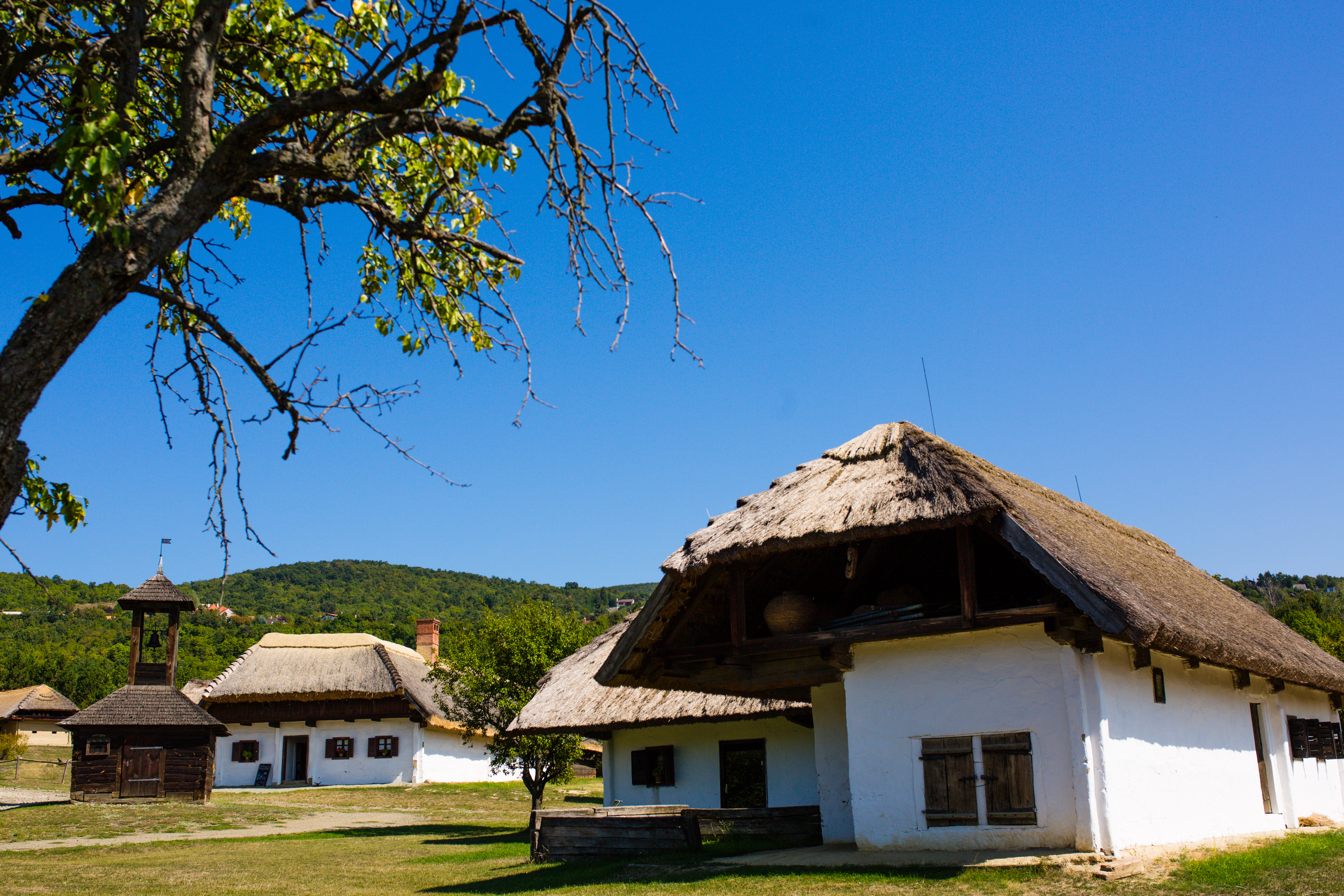 Szentendrei Skanzen, Nyugat-Dunántúl